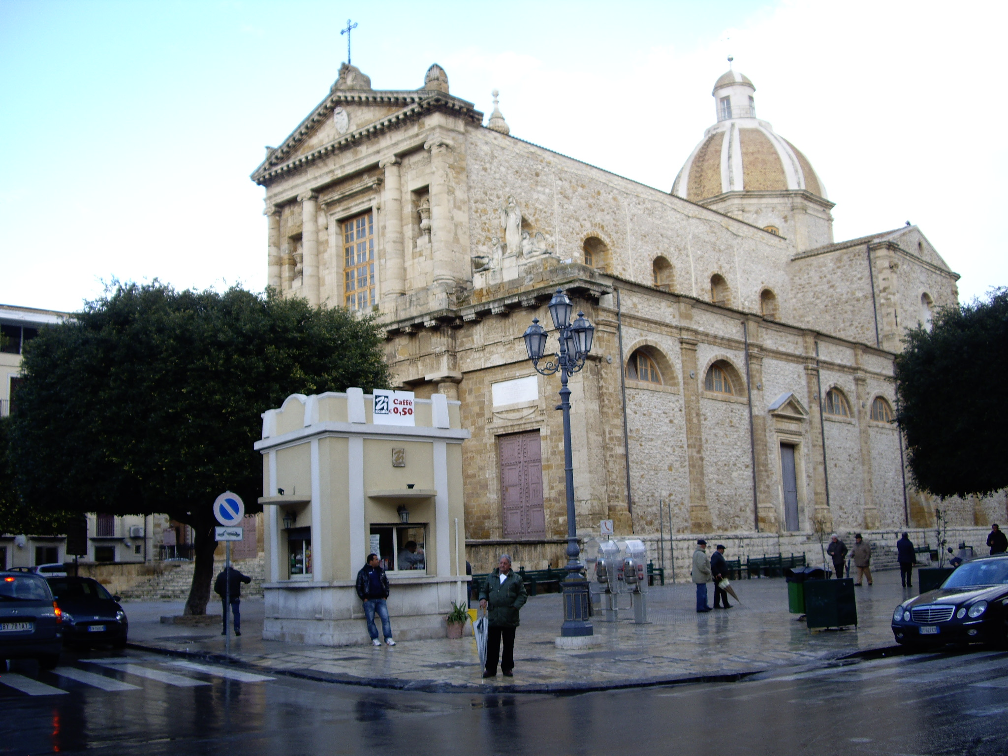 Gelako katedrala XIX. mendearen hasieran